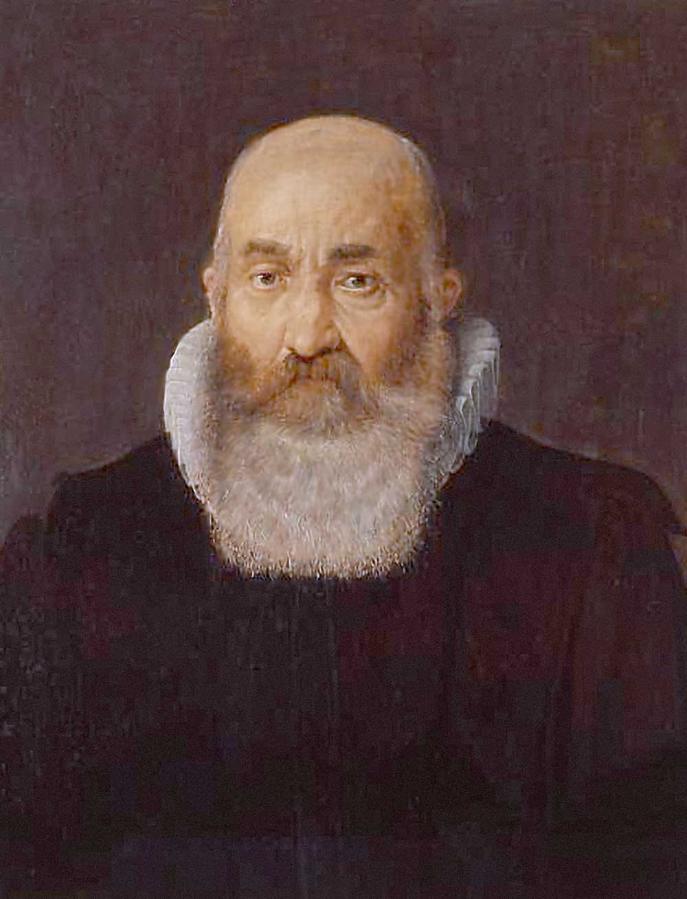 Portret van Bonaventure Vulcanius, hoogleraar Grieks en Latijn te Leiden. Icones Leidenses 24